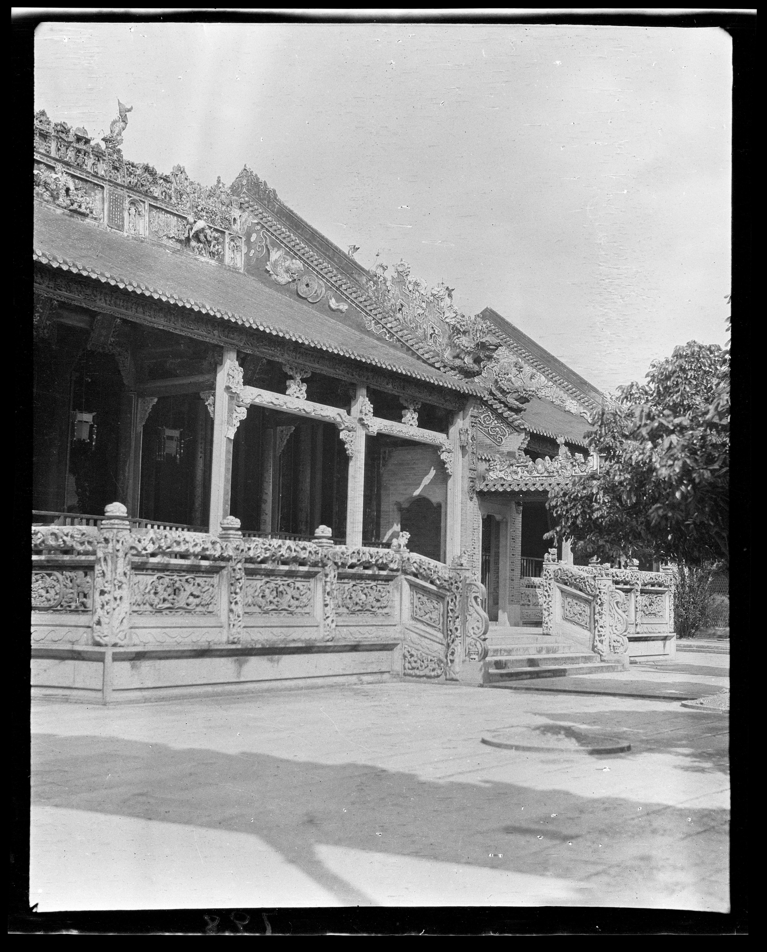 廣州市陳家祠圍欄